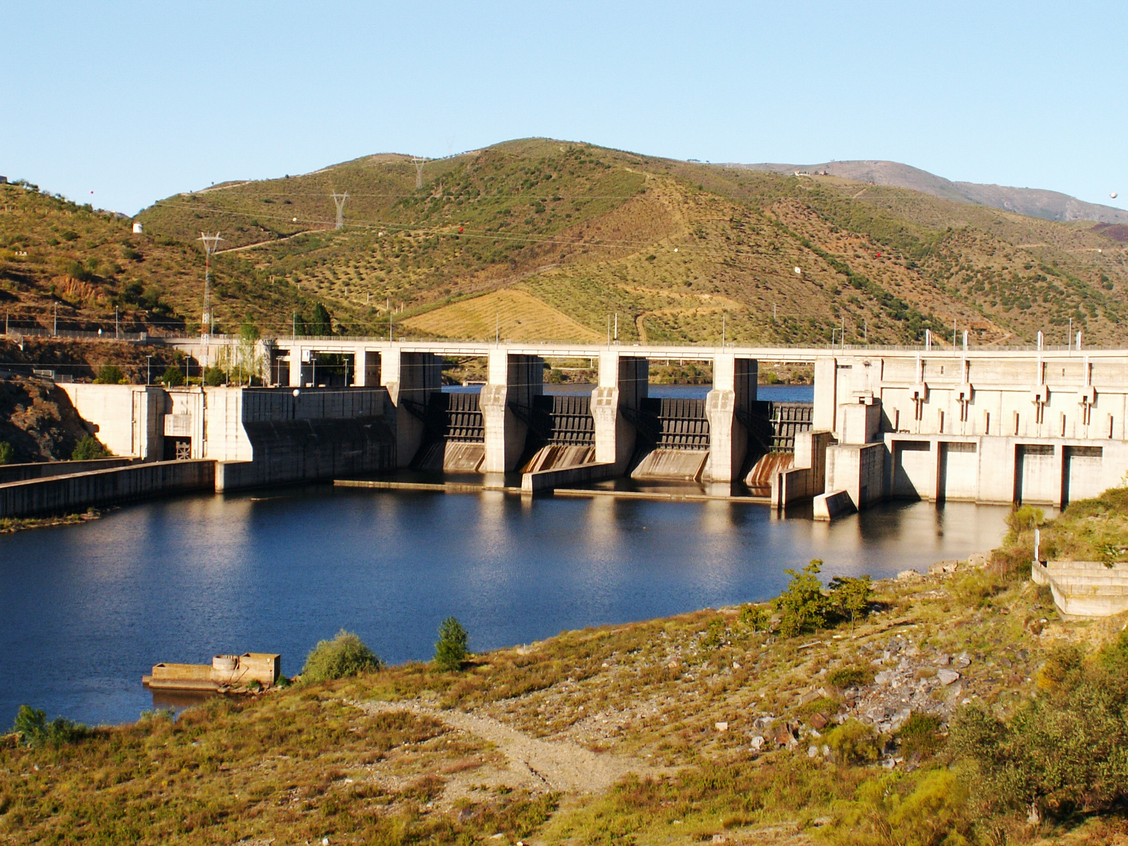 A landmark